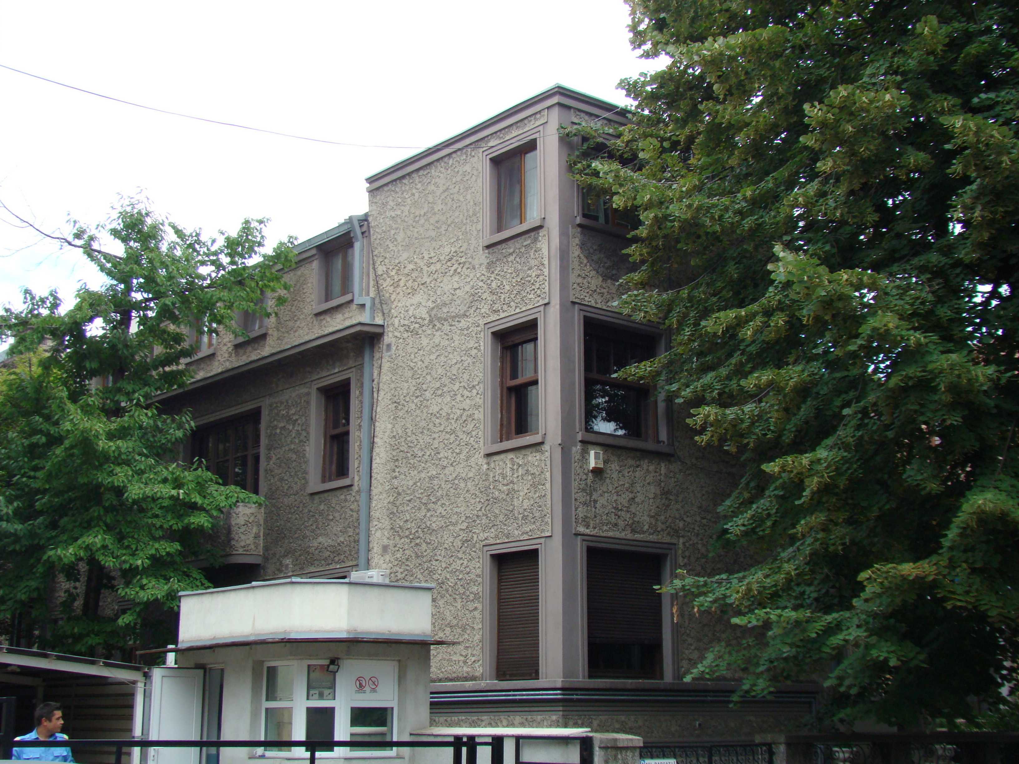 Clădire monument istoric, str. Roma, nr 28